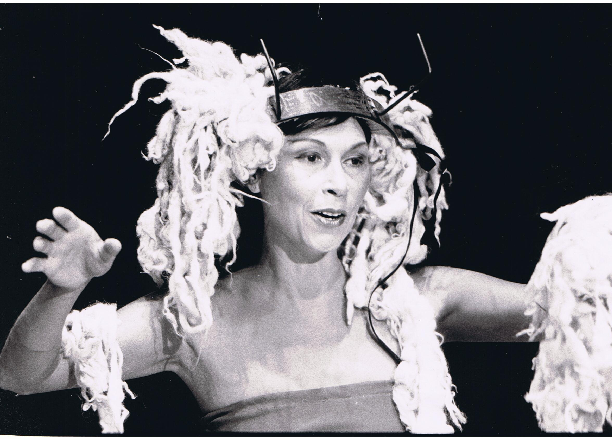 רות אשל היא רקדנית, חוקרת מחול, כוריאוגרפית ומבקרת מחול . צמר וברזל (מיתוס)- 1986, כוריאוגרפיה וריקוד- רות אשל, צילום - מורל דרפר